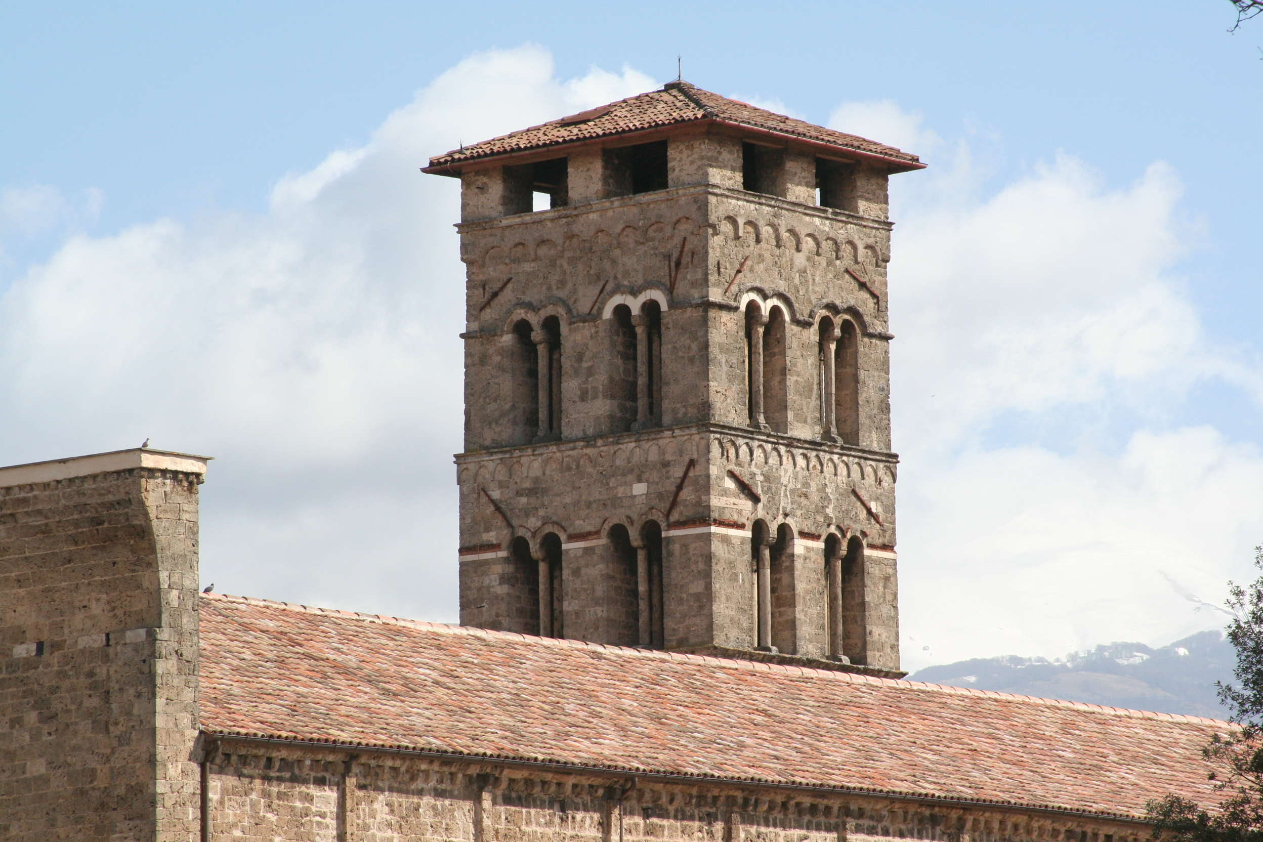 S. Agostino